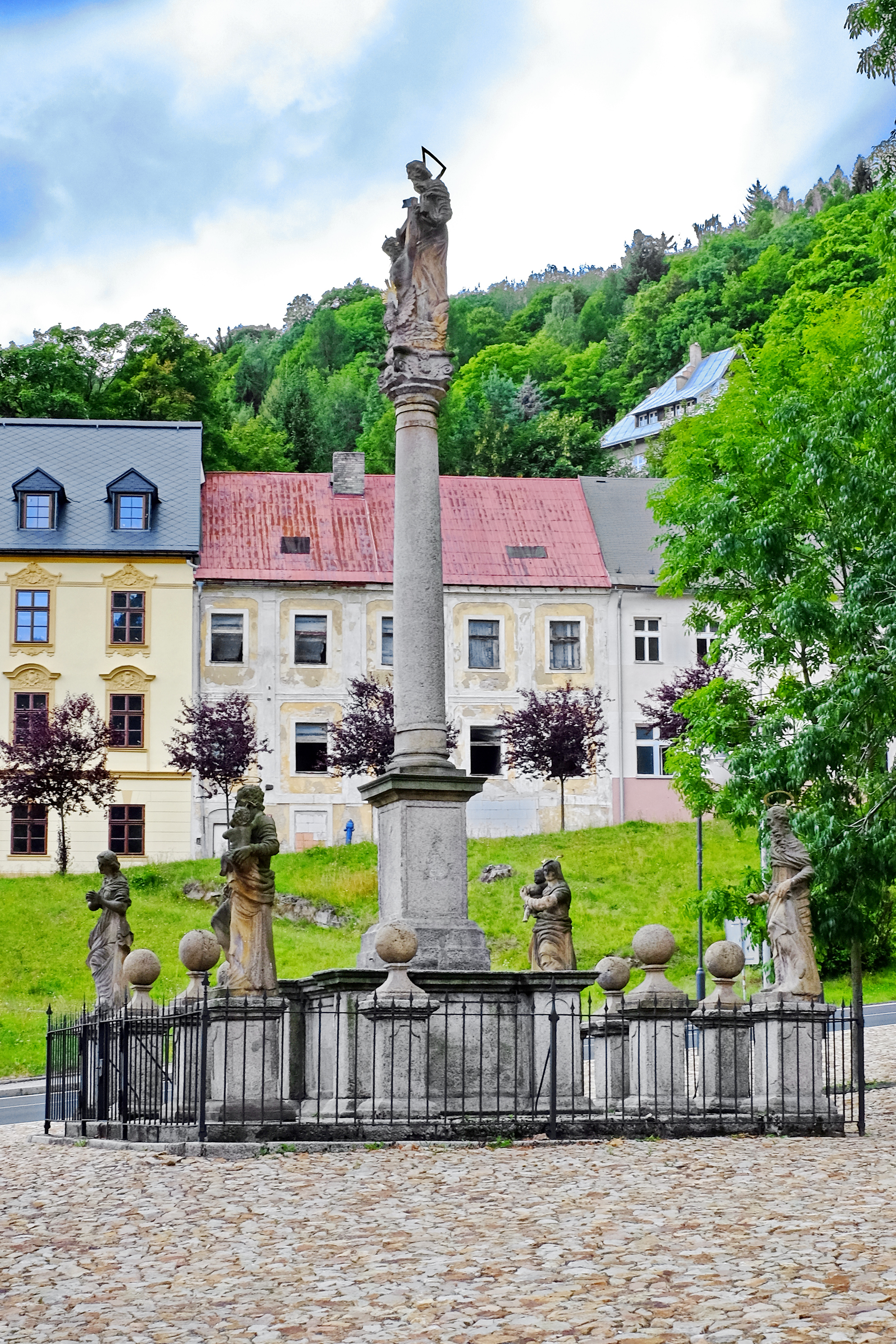 Sloup Nejsvětější Trojice, náměstí Republiky, pp. 4882/4, Jáchymov.